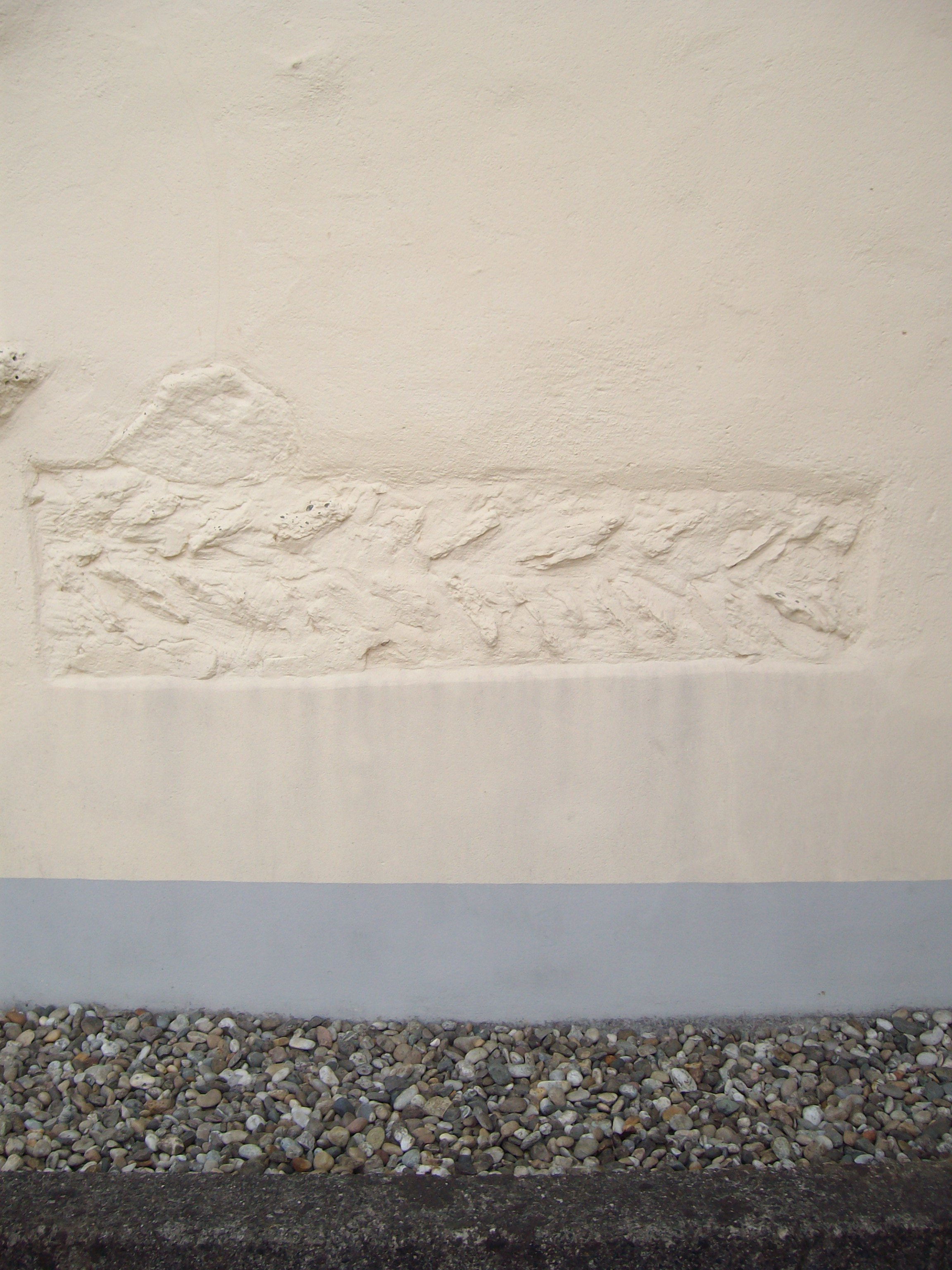 Evangelische Kirche Queckborn, Grünberg, Landkreis Gießen, Hessen, Deutschland